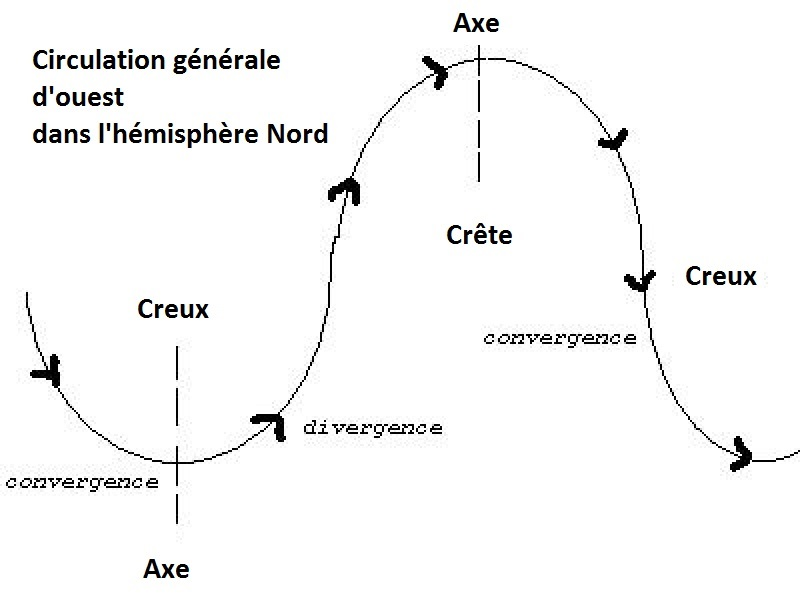 Représentation idéale d'une suite de creux et crête barométrique en altitude dans l'hémisphère Nord. On peut y voir les axes de ces systèmes et les zones de convergence et divergence. DNas l'hémisphère Sud, la position des crêtes et creux est inversée mais les zones de zones de convergence et divergences restent les mêmes